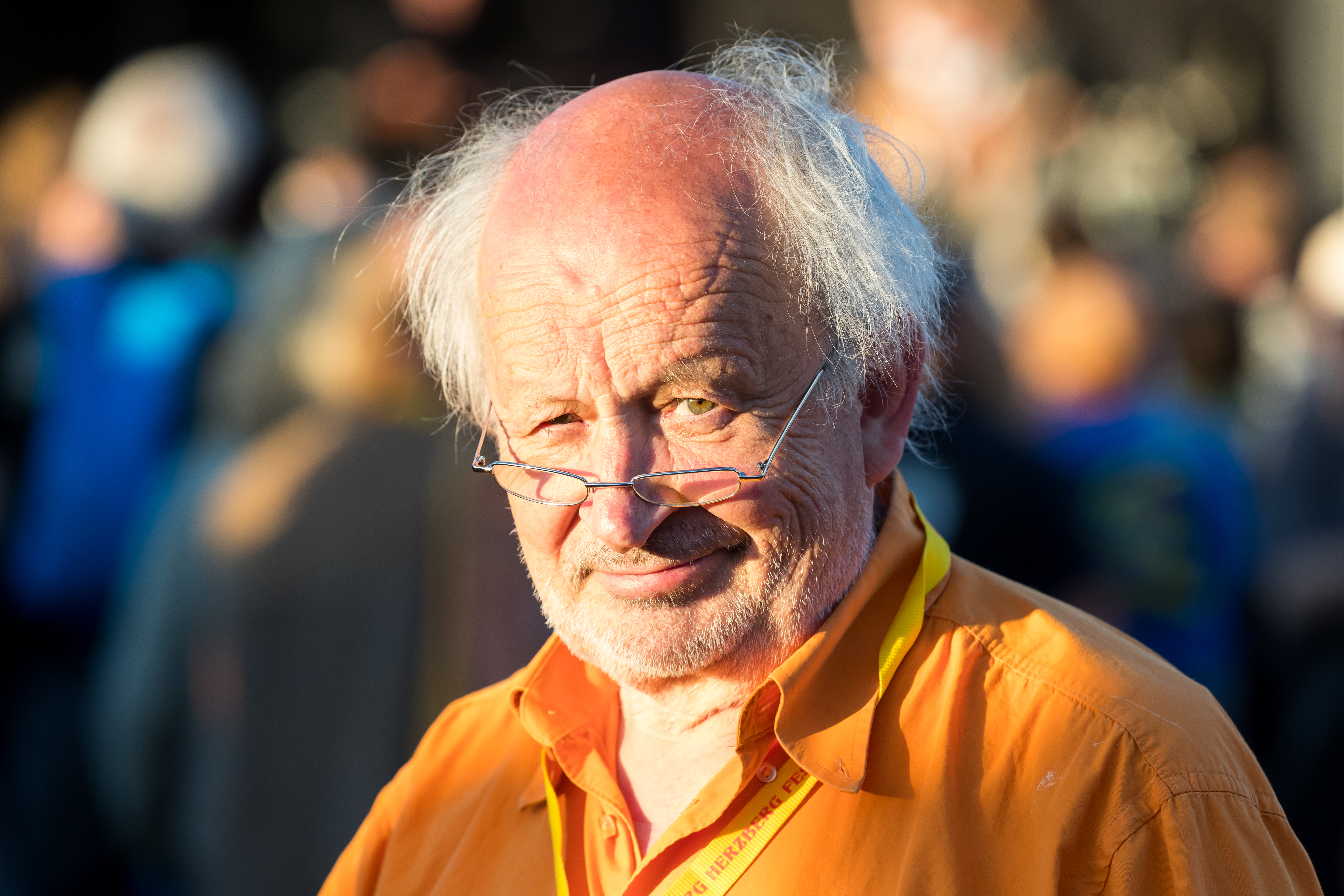 Günter Zint during Burg Herzberg Festival at Hessen, Breitenbach am Herzberg, , Germany on 2017-07-29, Photo: Sven Mandel